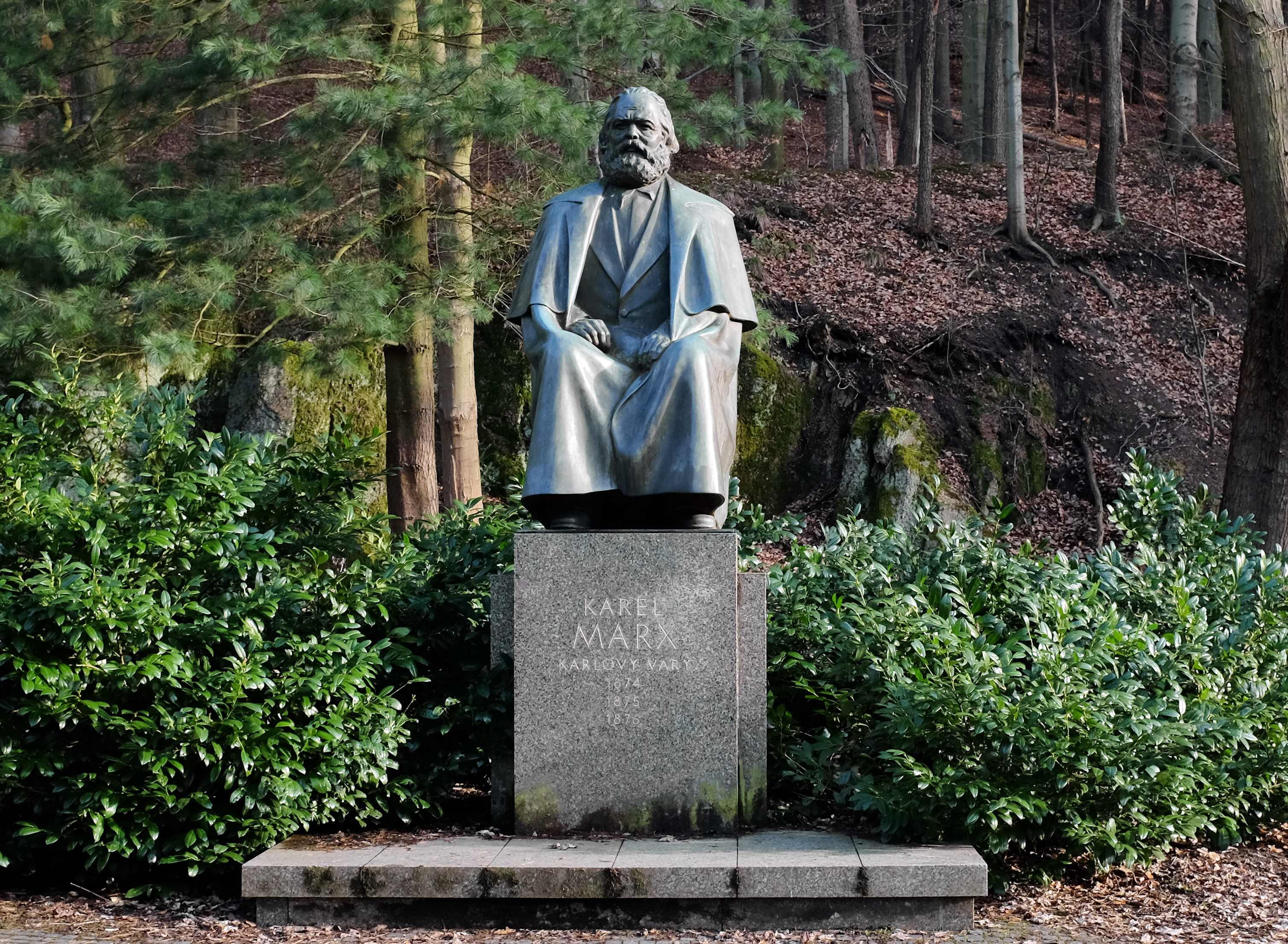 Socha Karla Marxe v Karlových Varech